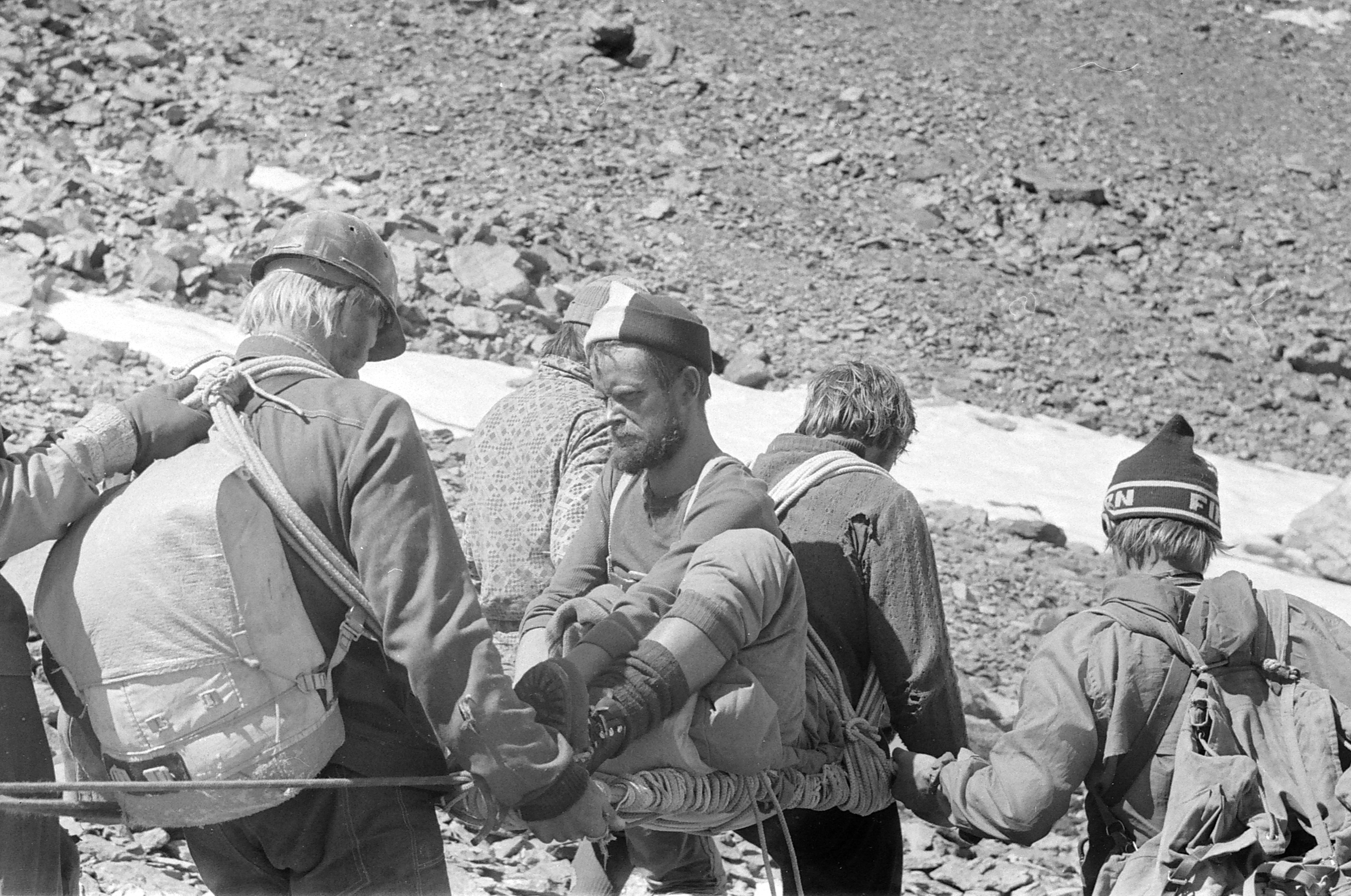 Ekspeditsioon mäetipule "Tartu Ülikool 350". Hindrek Kriisi kandmine.